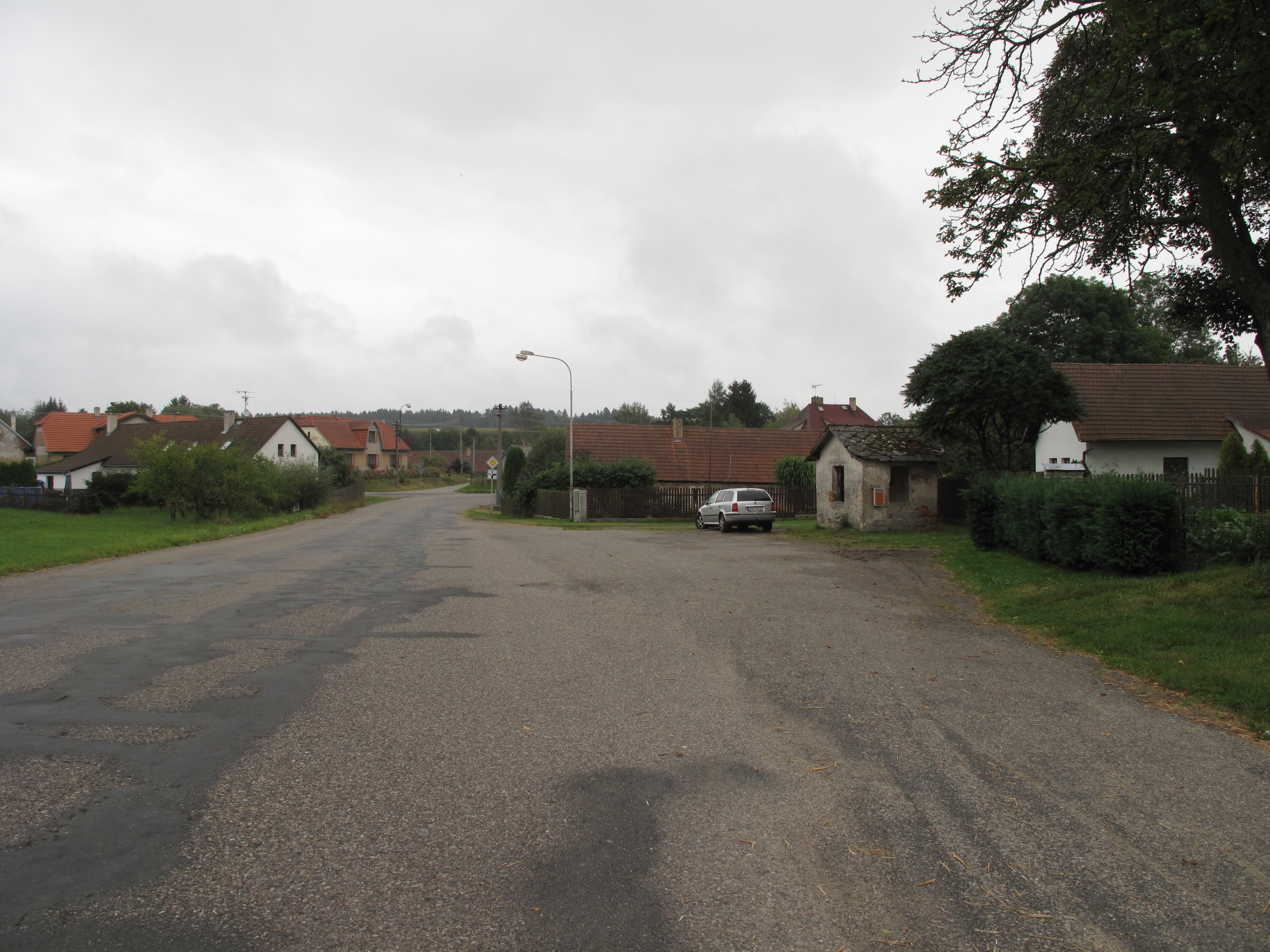 Silnice v Horní Lhotě. Okres Benešov, Česká republika.